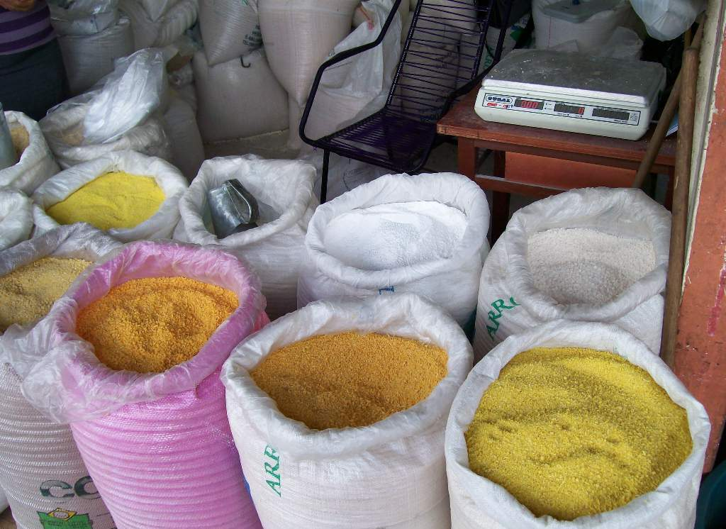 Vários tipos de farinhas de mandioca à venda no Mercado Vicente Fitz (Mercadinho), em Imperatriz Maranhão.